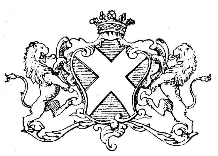 Armes de la famille de Giry. D'azur au sautoir d'argent.